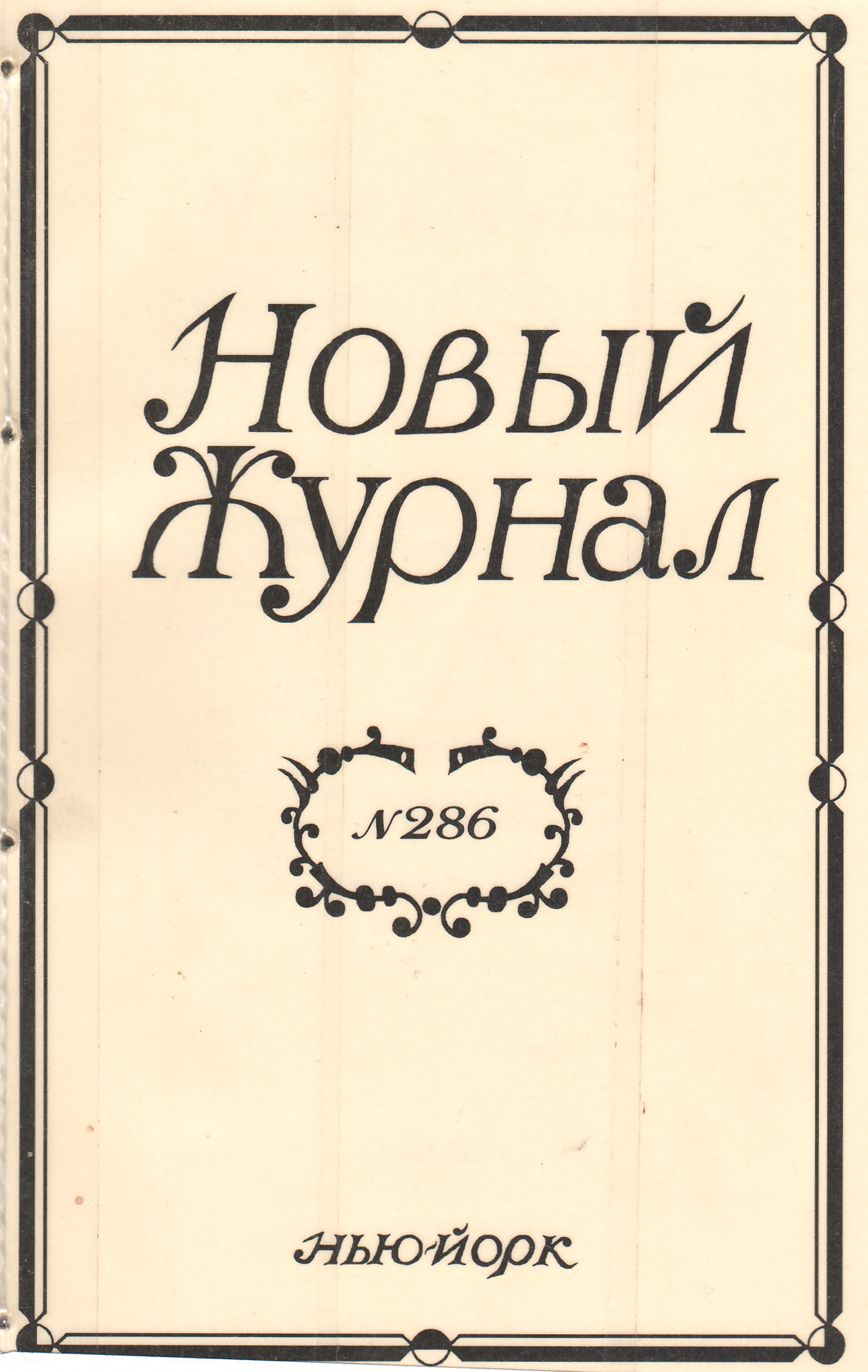 В этом номере журнала опубликована повесть А. Белозёрова "Галерея ПМР" - лауреат премии им. Марка Алданова-2016